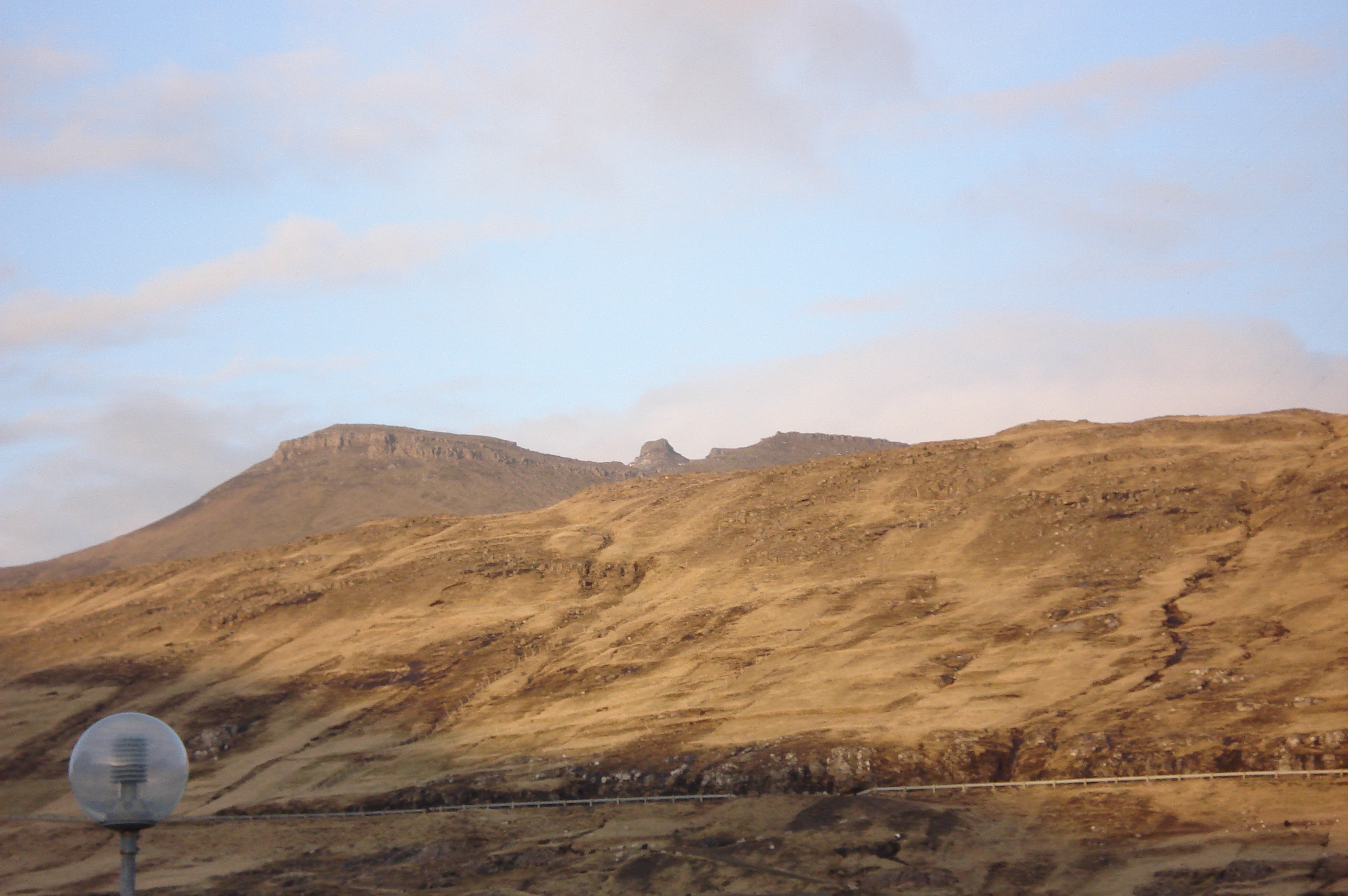 Føroyskt: Gráfelli, 856m (longst burtur), Krákan, 821m(lítli tindurin í miðjuni) og Manssetur, 615m (fjallið longst til vinstru), sæð av Eiði.